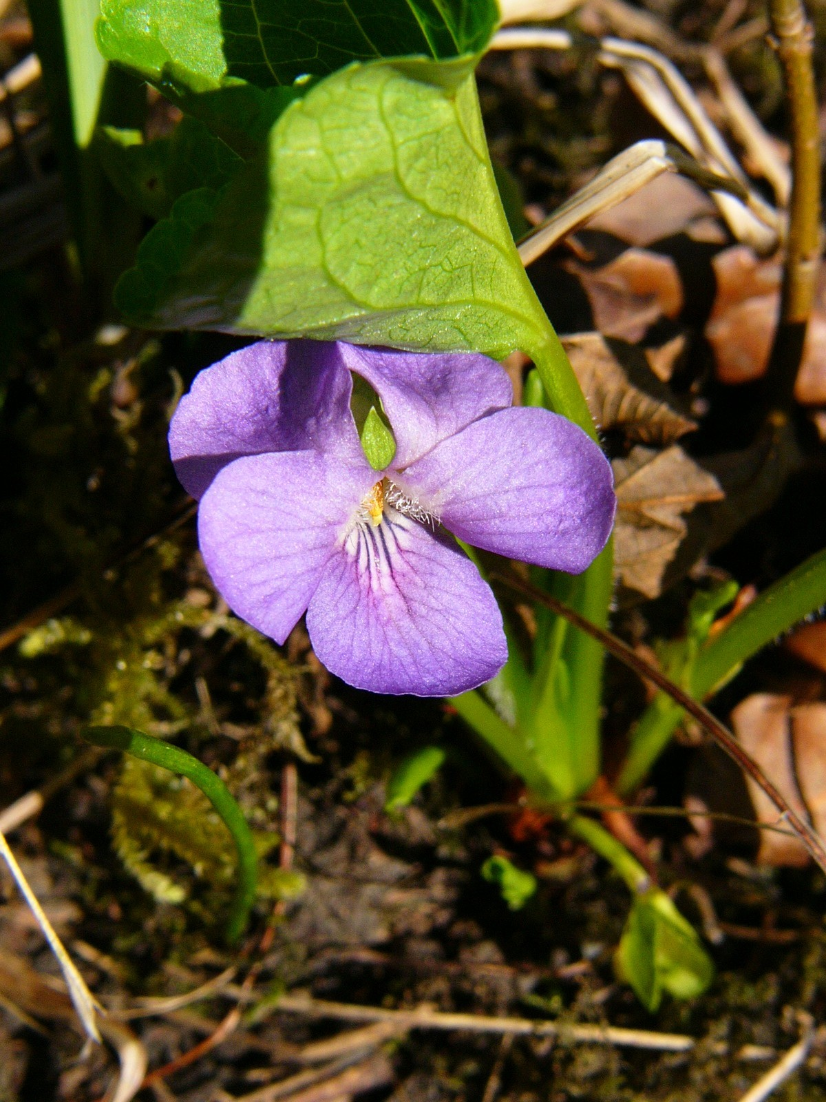 Wunderveilchen Blüte